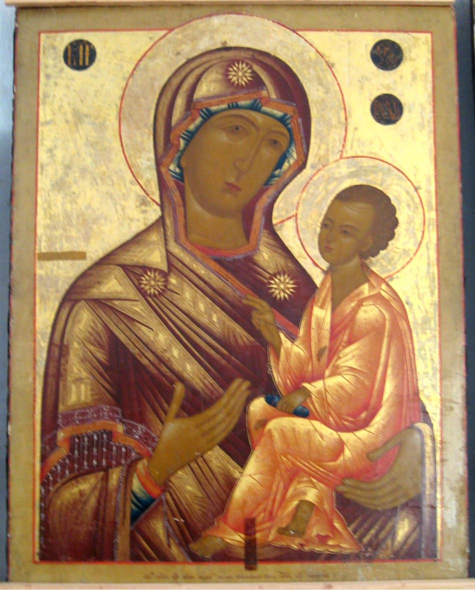 Икона Тихвинской Богоматери (Ферапонтов монастырь)